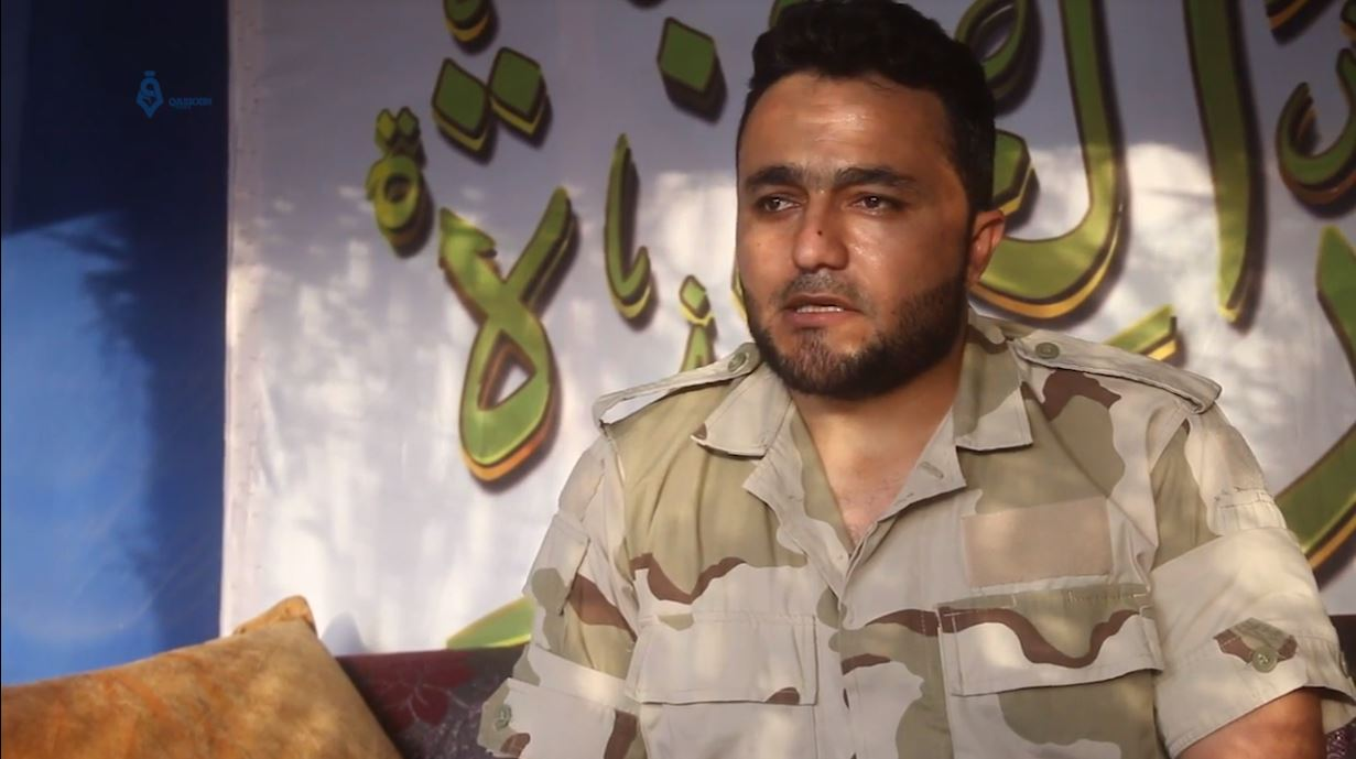 Porte-parole du groupe rebelle syrien Jaych al-Ezzah, le 1er octobre 2018.